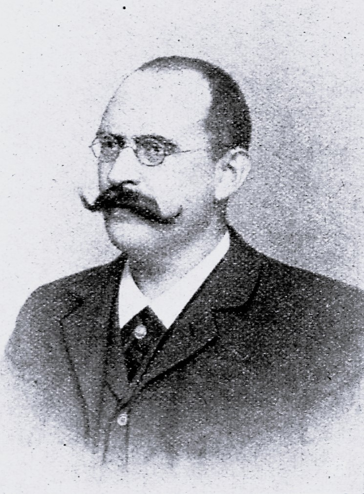 Heinrich Schabbel, Bäckermeister, Begründer der „Schabbel-Stiftung“